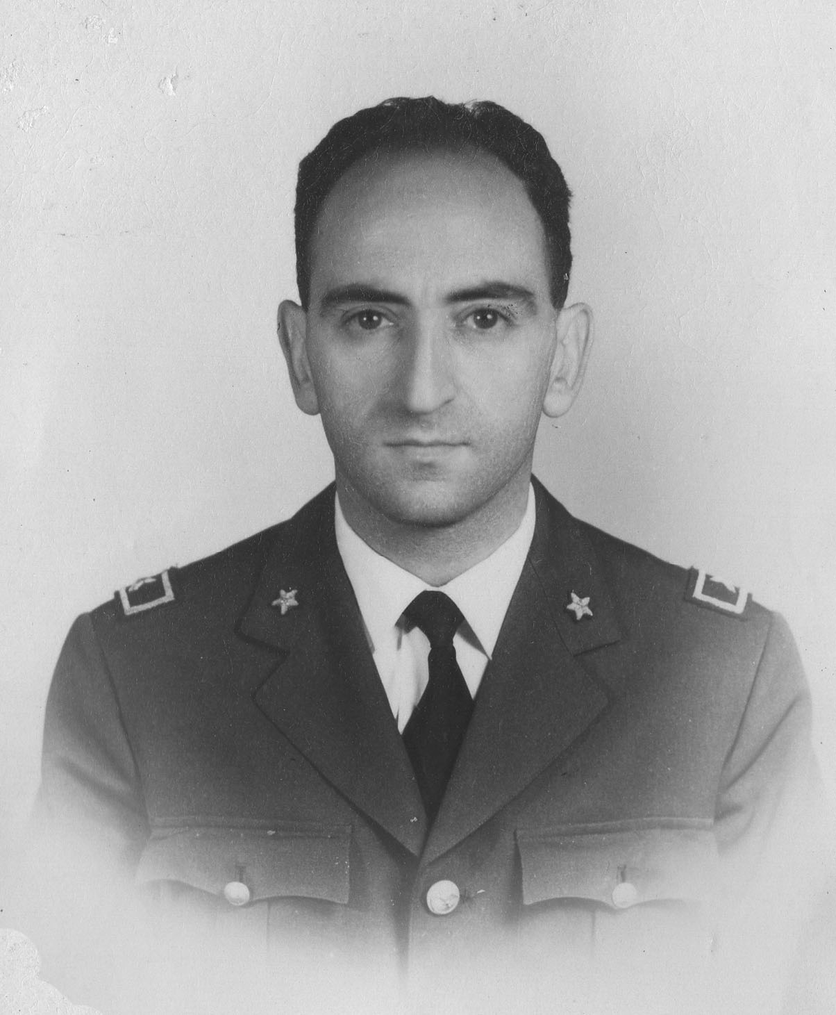 Michele Dicran Sirinian in una foto storica